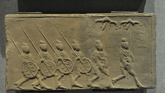 邓州南朝画像砖